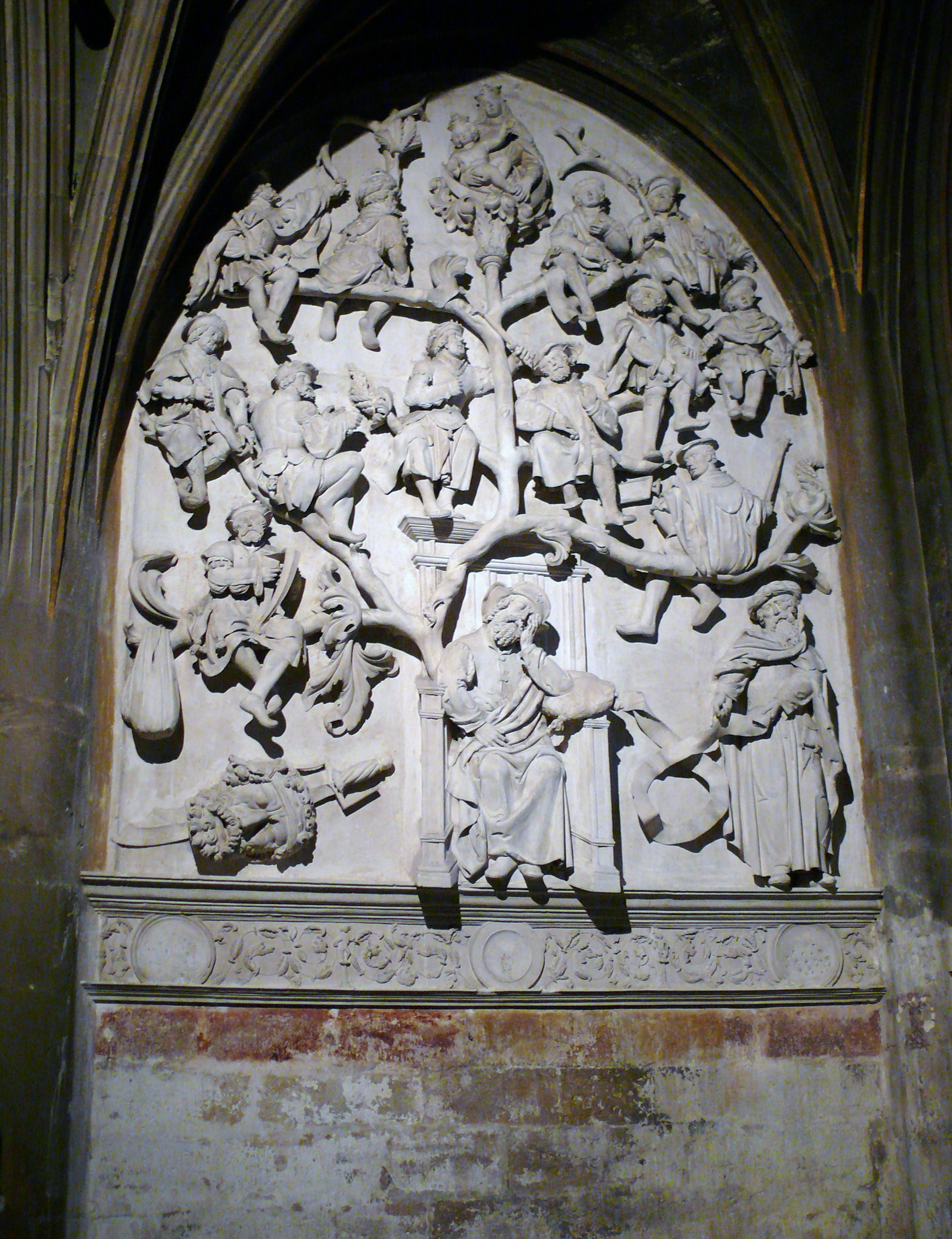 Sculpture représentant l'arbre généalogique de jésus dans la basilique Saint Jean Baptiste à Chaumont dans la Haute-Marne.